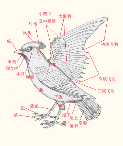 鸟体分区，底图来自德语维基，其他部分自行绘制，本图片不允许百度百科使用